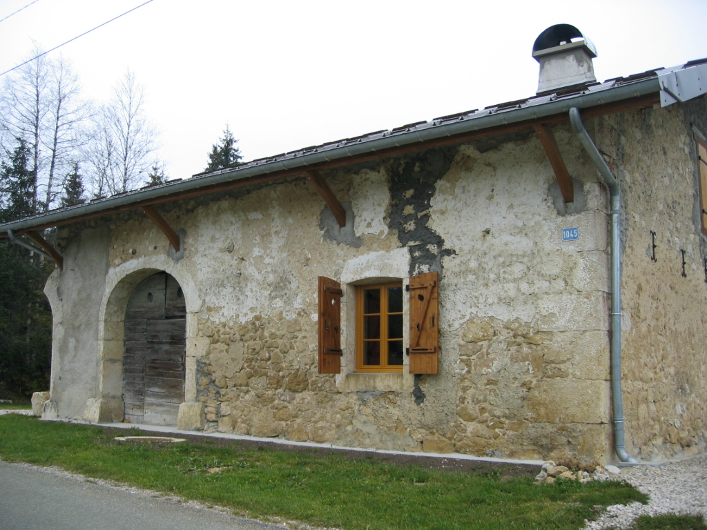 Maison typique du Haut Jura - France - Région des Rousses